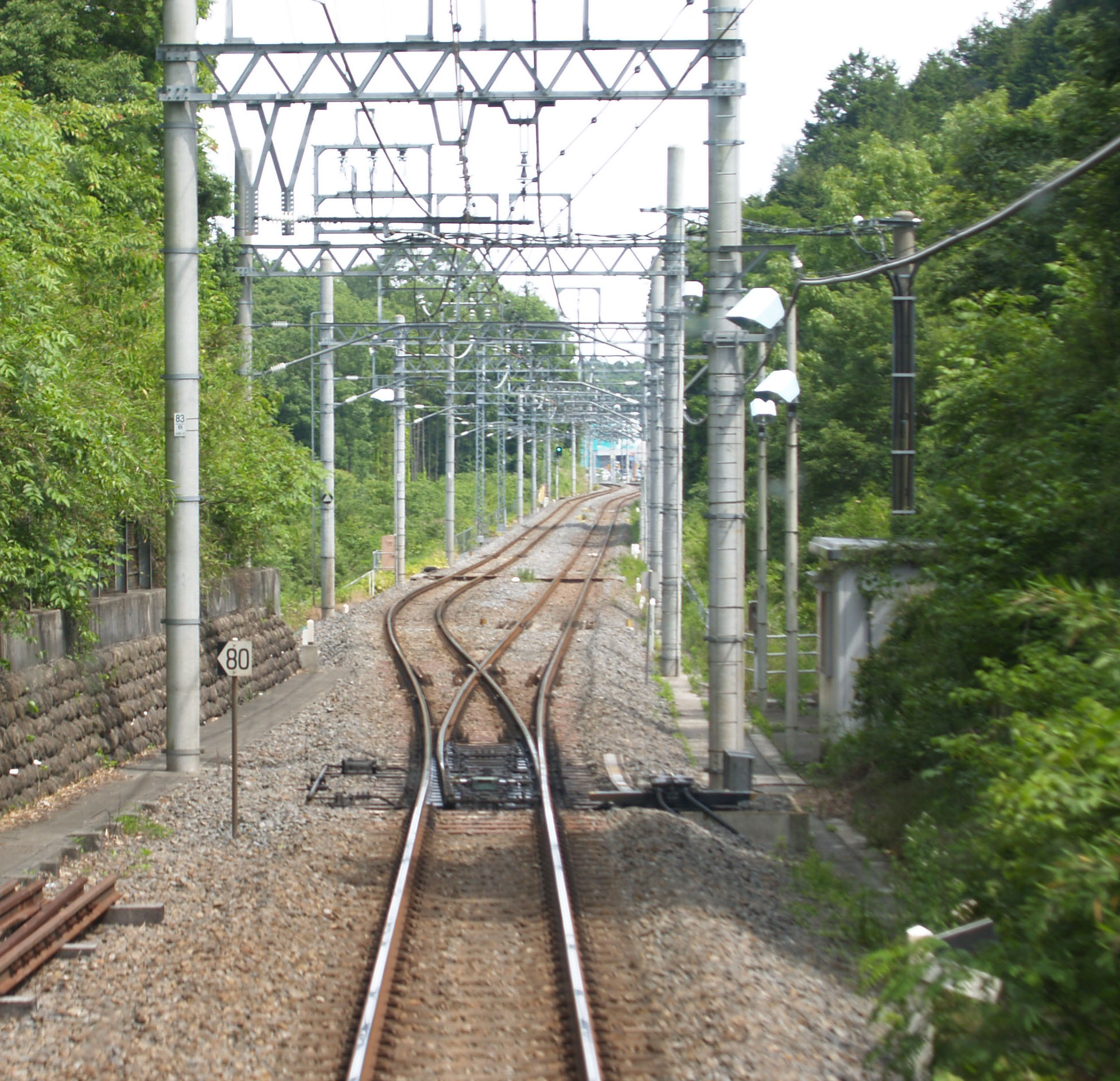 嵐山信号所（小川町方から撮影）